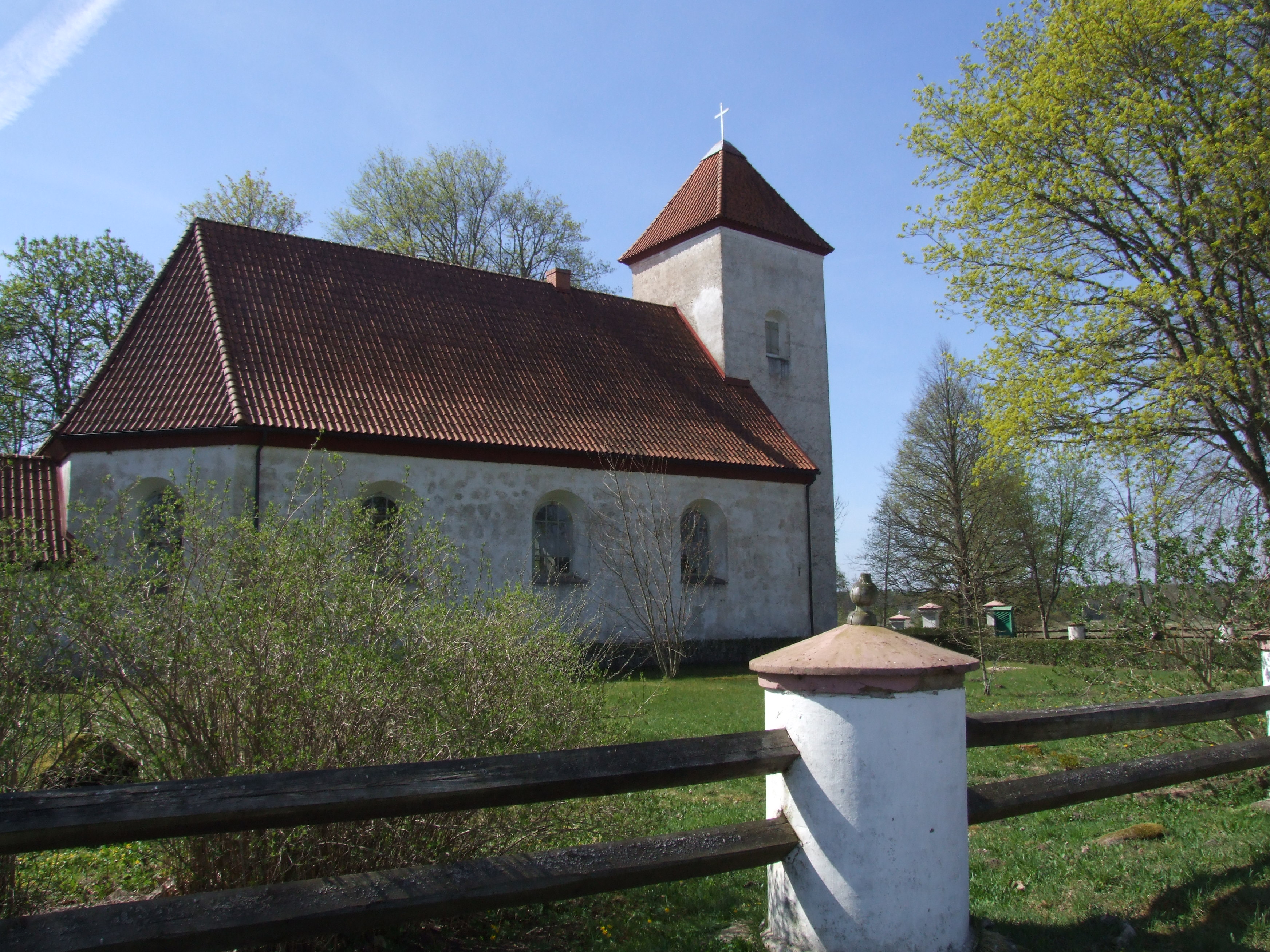 Puze Church